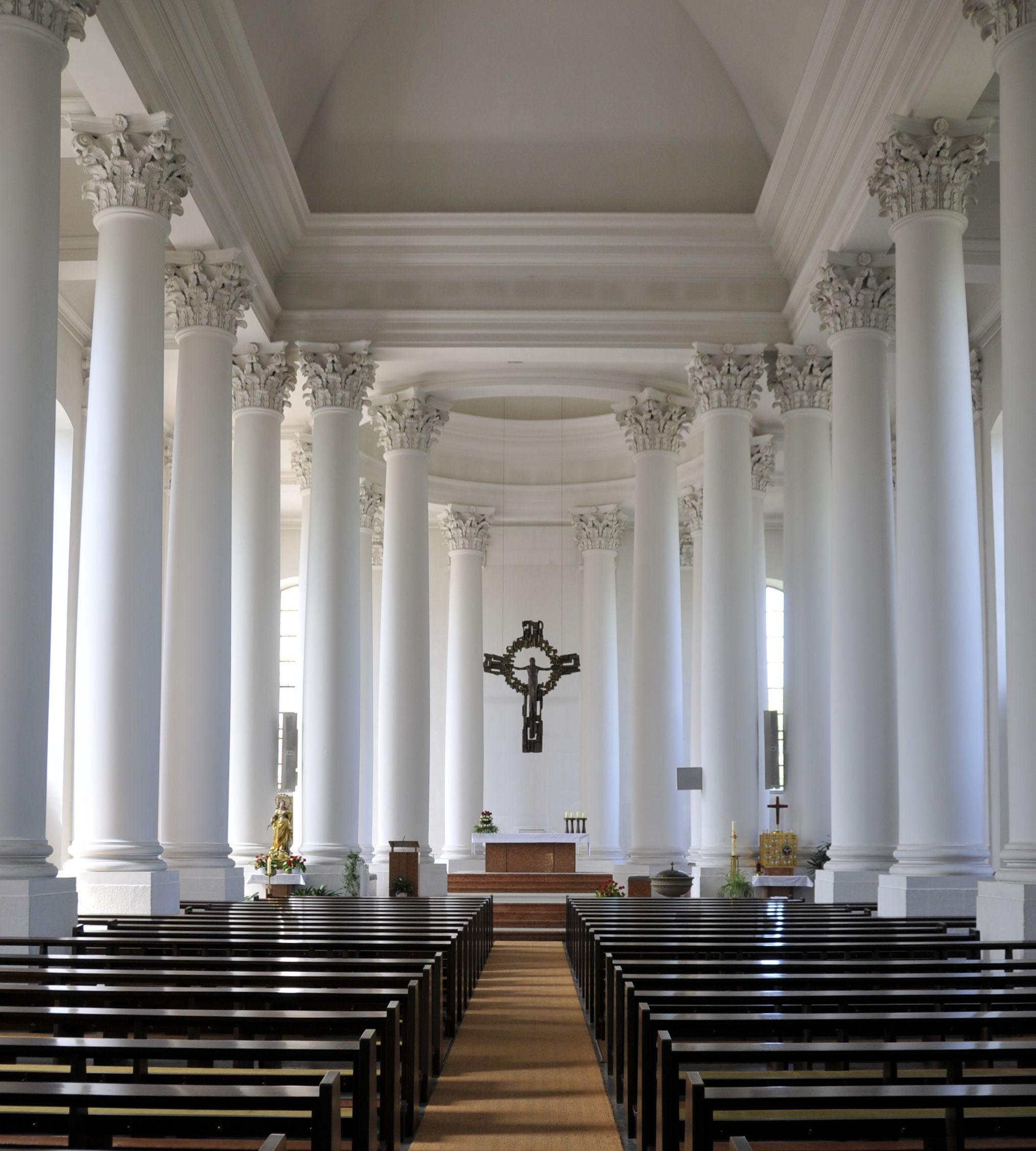 Innenaufnahme der Kirche Mariä Himmelfahrt in Neustadt an der Saale